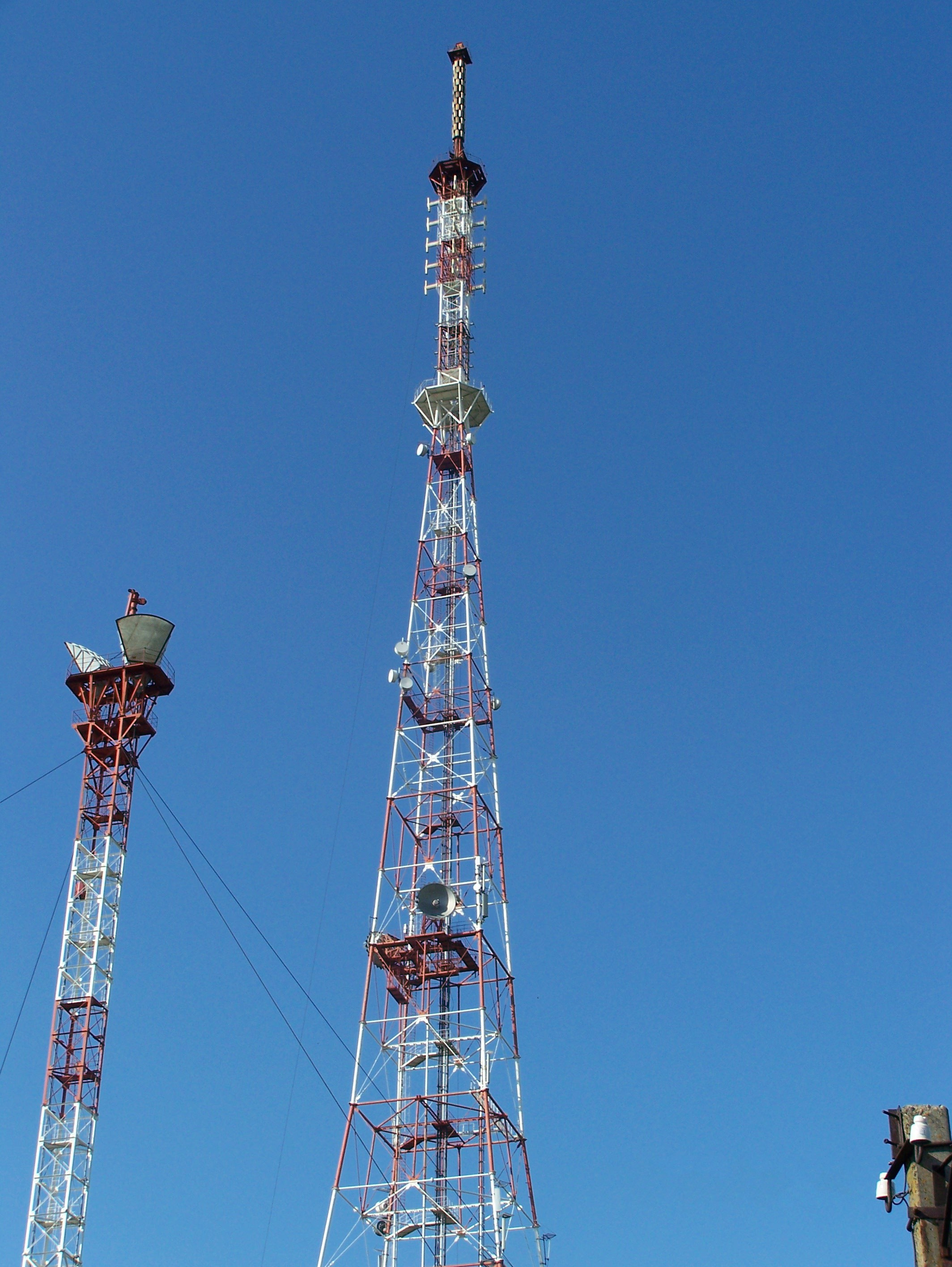 Чимишлийская телебашня